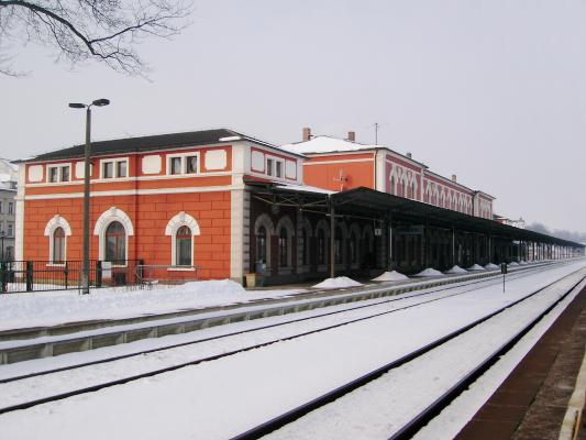 Bahnhof Löbau selbst erstellt und auf veröffentlicht